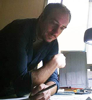 Luca Raimondo - maggio 2015